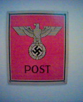 Reichspost: Reichsadler in der Zeit des Nationalsozialismus mit Hakenkreuz im Eichenkranz in den Fängen (1933 - 1945)